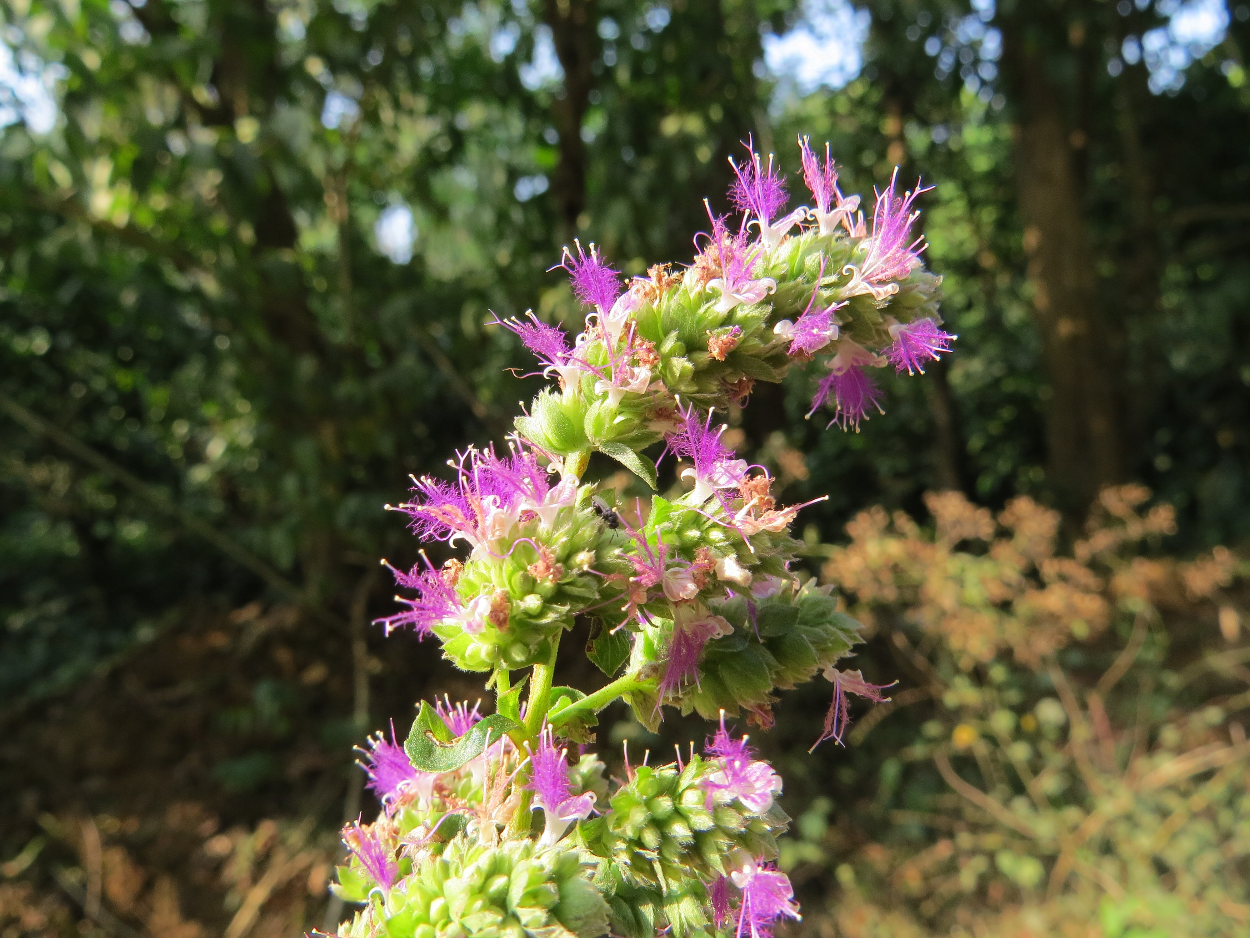 Photos by Vinayaraj